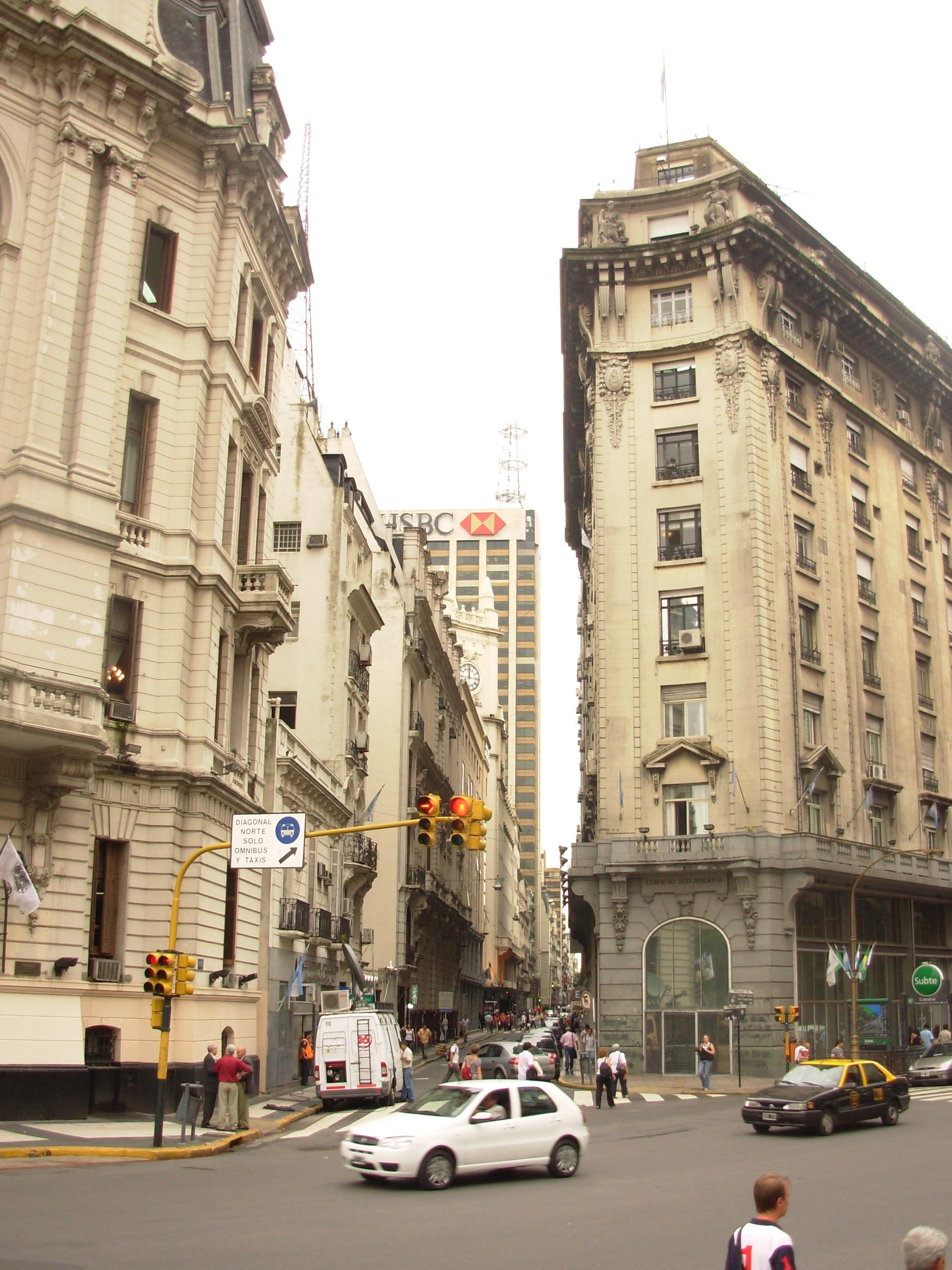 Rivadavia and Diagonal Norte Avenues, Buenos Aires